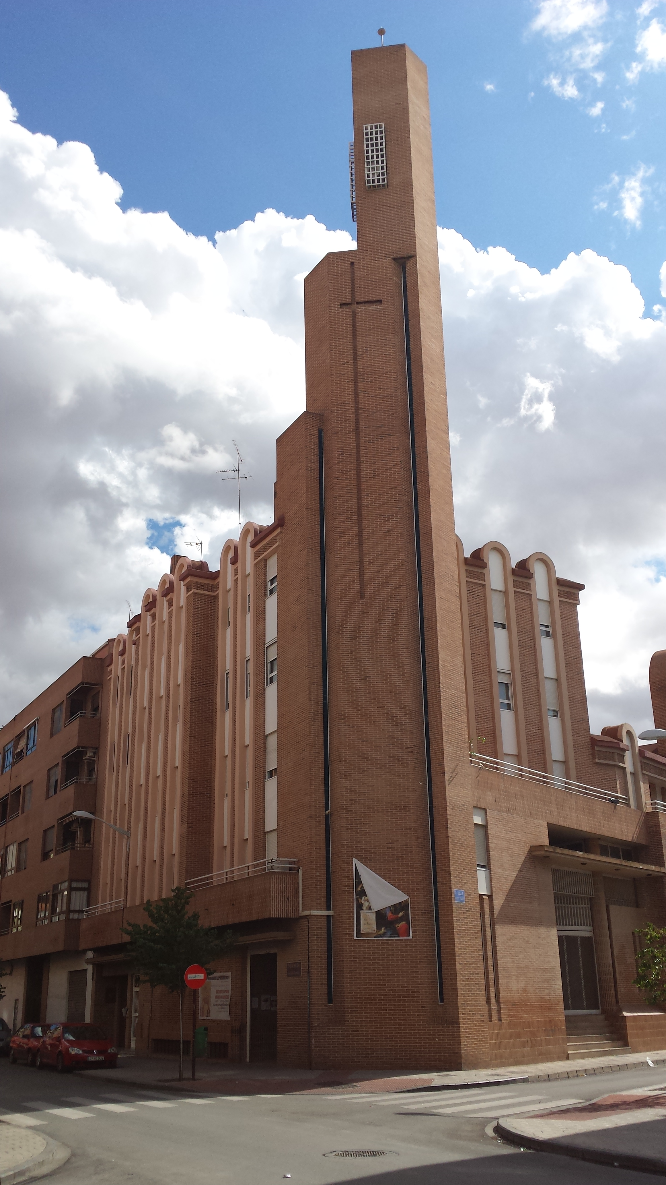 Parroquia de la Sagrada Familia. Barrio Industria. Albacete